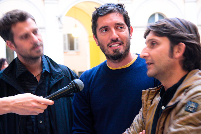 Prima serata della Settimana Internet @ Roma. Si è parlato di Internet e Turismo con ospiti d'eccezione come il Trio Medusa.